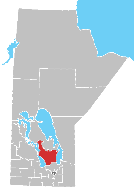 Manitoba census area No. 18